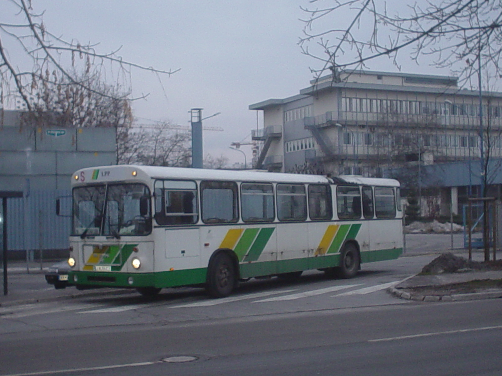 Avtobus pred tovarno Lek